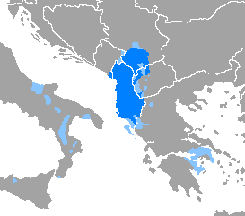 Idioma albanés Donde es mayoritario Donde es minoritario